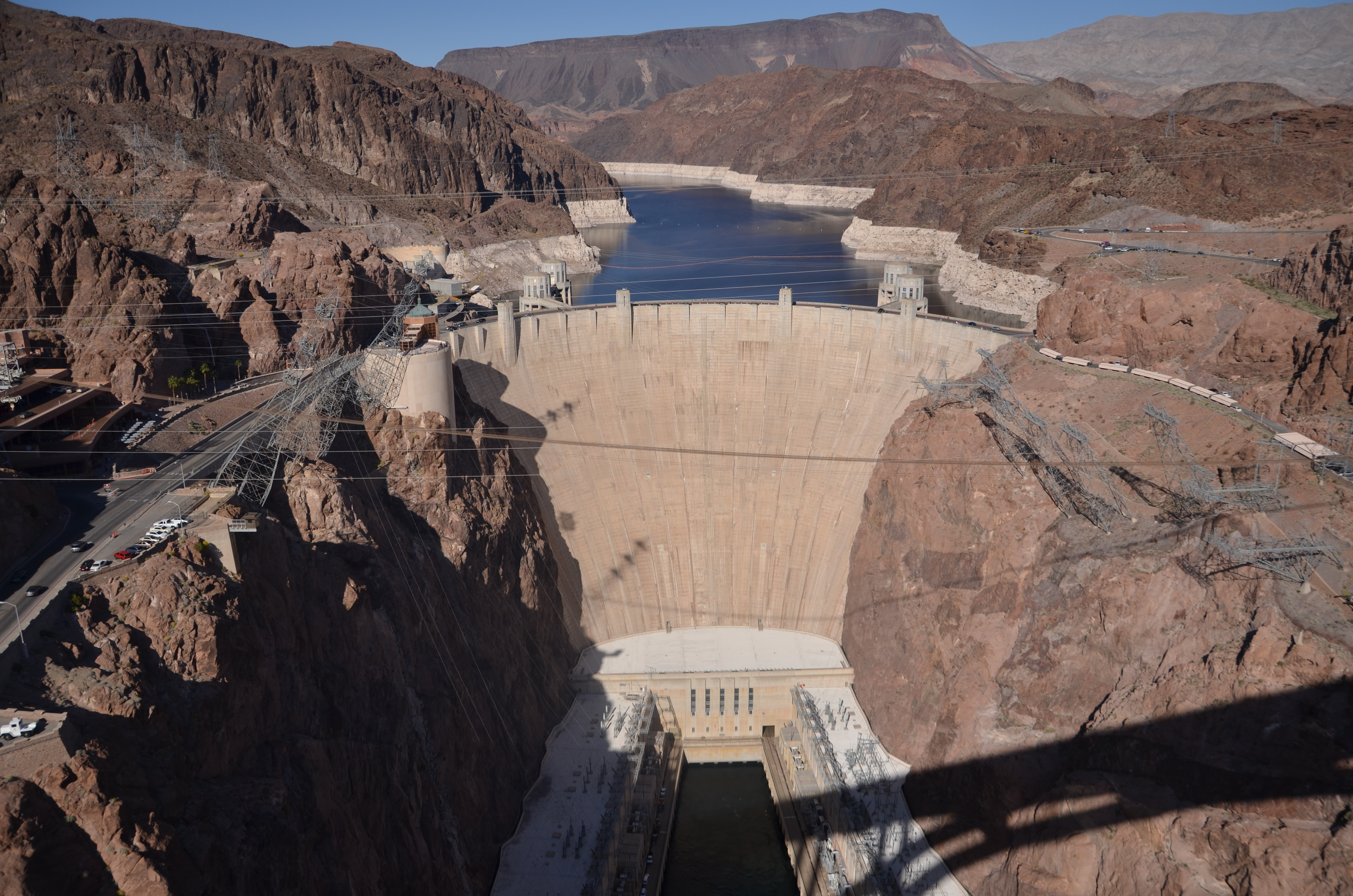 Le Barrage de hoover en 2013